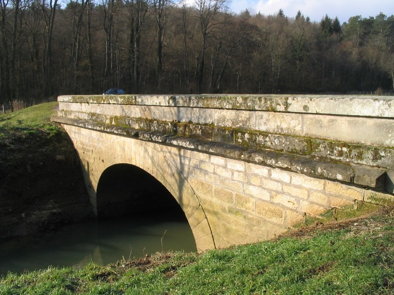 Ougeotte - Pont aux oies - Montigny-lès-Cherlieu